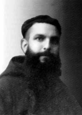 Germán de Carcagente